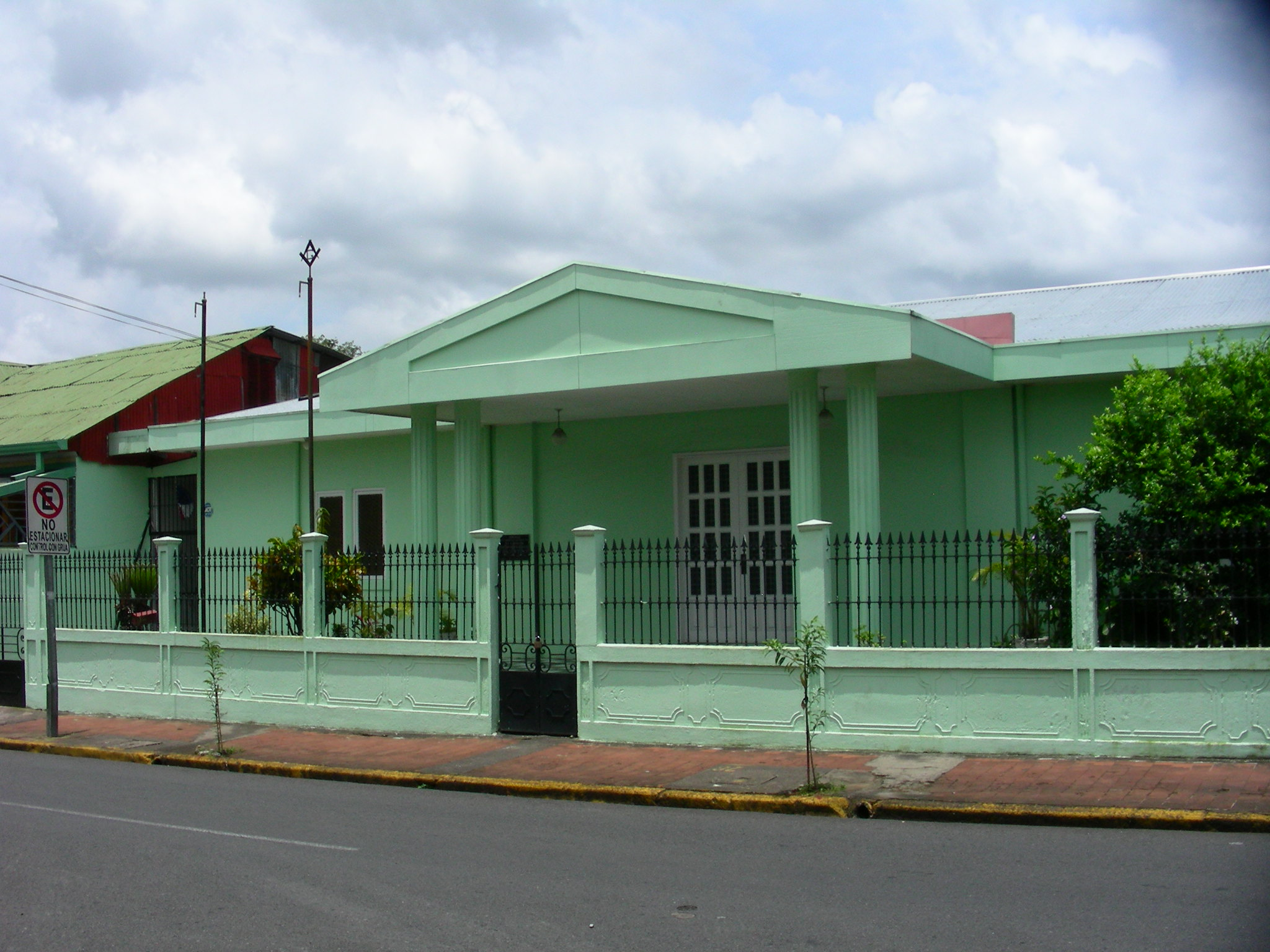 Sede de los masones en Alajuela, Costa Rica.